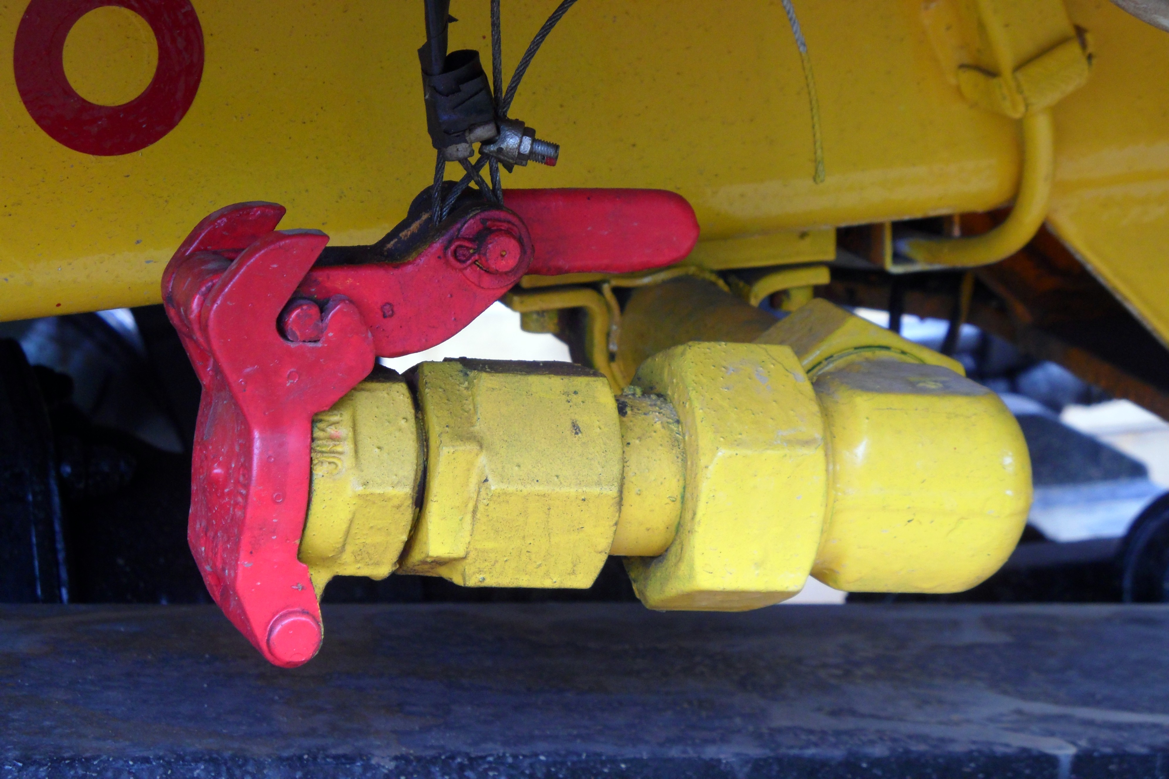 … oder »Ackermannventil« einer Materialförder- und Siloeinheit MFS-100 unter dem Rahmen, die beiden Drahtseile führen zu den Notbremsgriffen. Das Drehen des Verschlusshebels nach oben gibt den Verschlussdeckel und damit den vollen Leitungsquerschnitt frei. Der rote Ring darüber ist die international übliche Kennzeichnung der Lage des Notbremsventils.